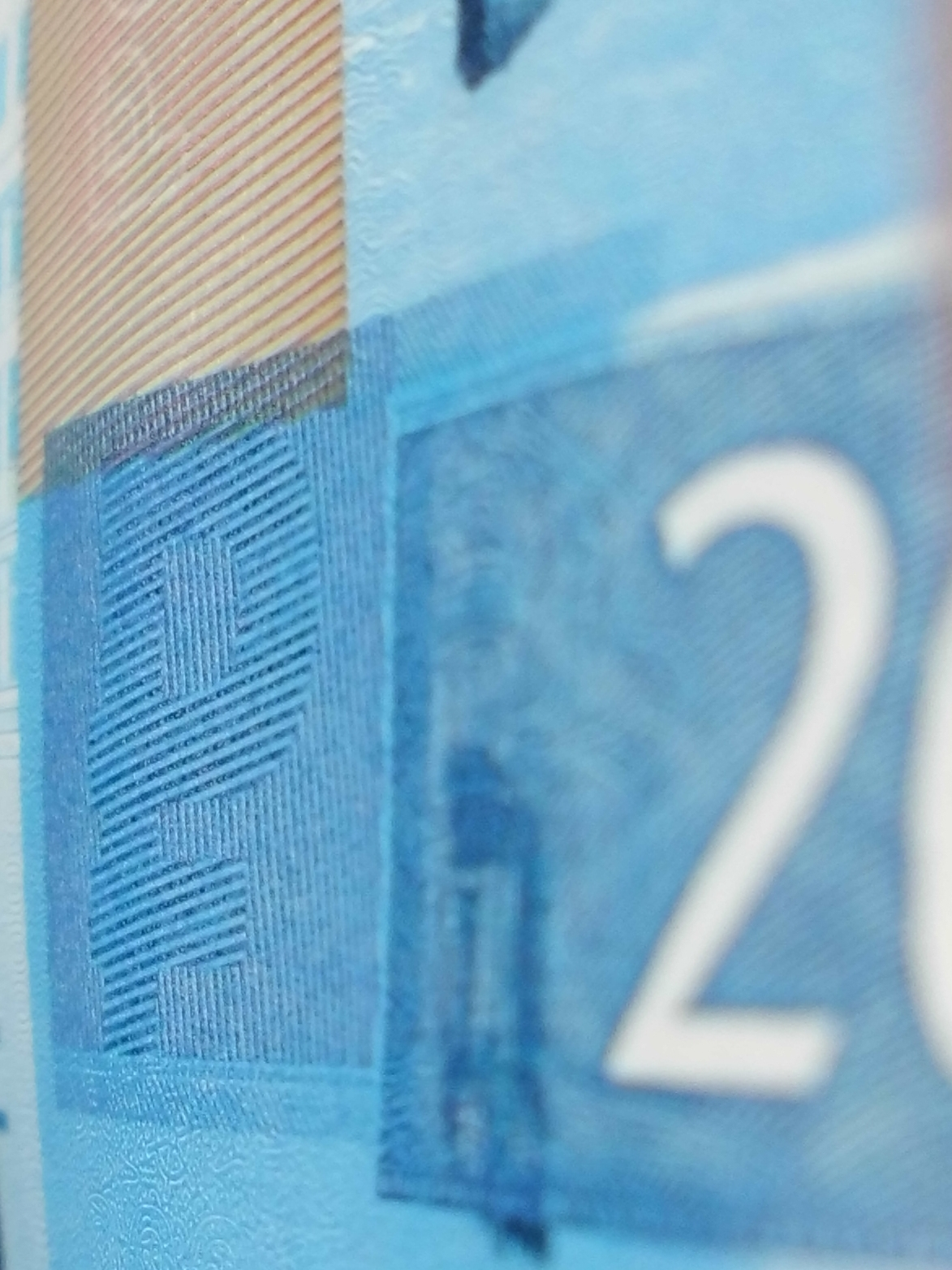 2000 российских рублей образца 2017 года. Аверс. Символ рубля с КИПП-эффектом. Вид под острым углом с правой стороны банкноты.